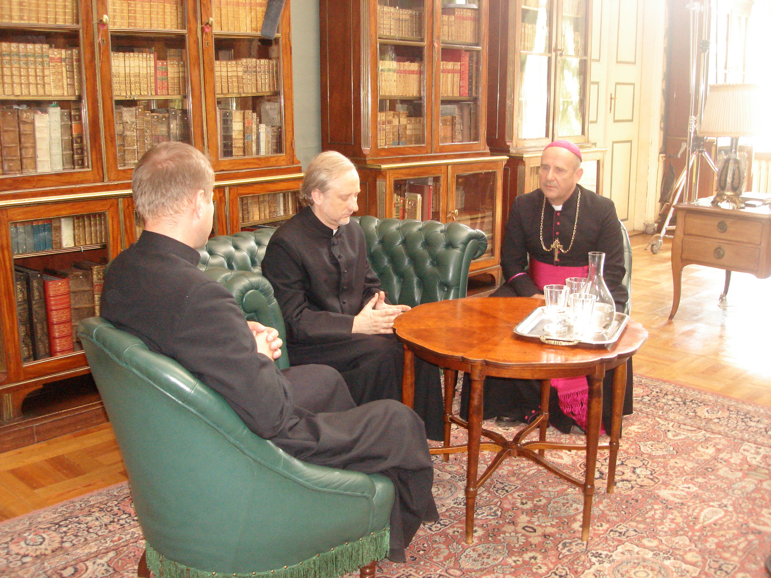 Ojciec Mateusz z wizytą u Biskupa